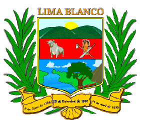 Escudo del municipio Lima Blanco, estado Cojedes, Venezuela